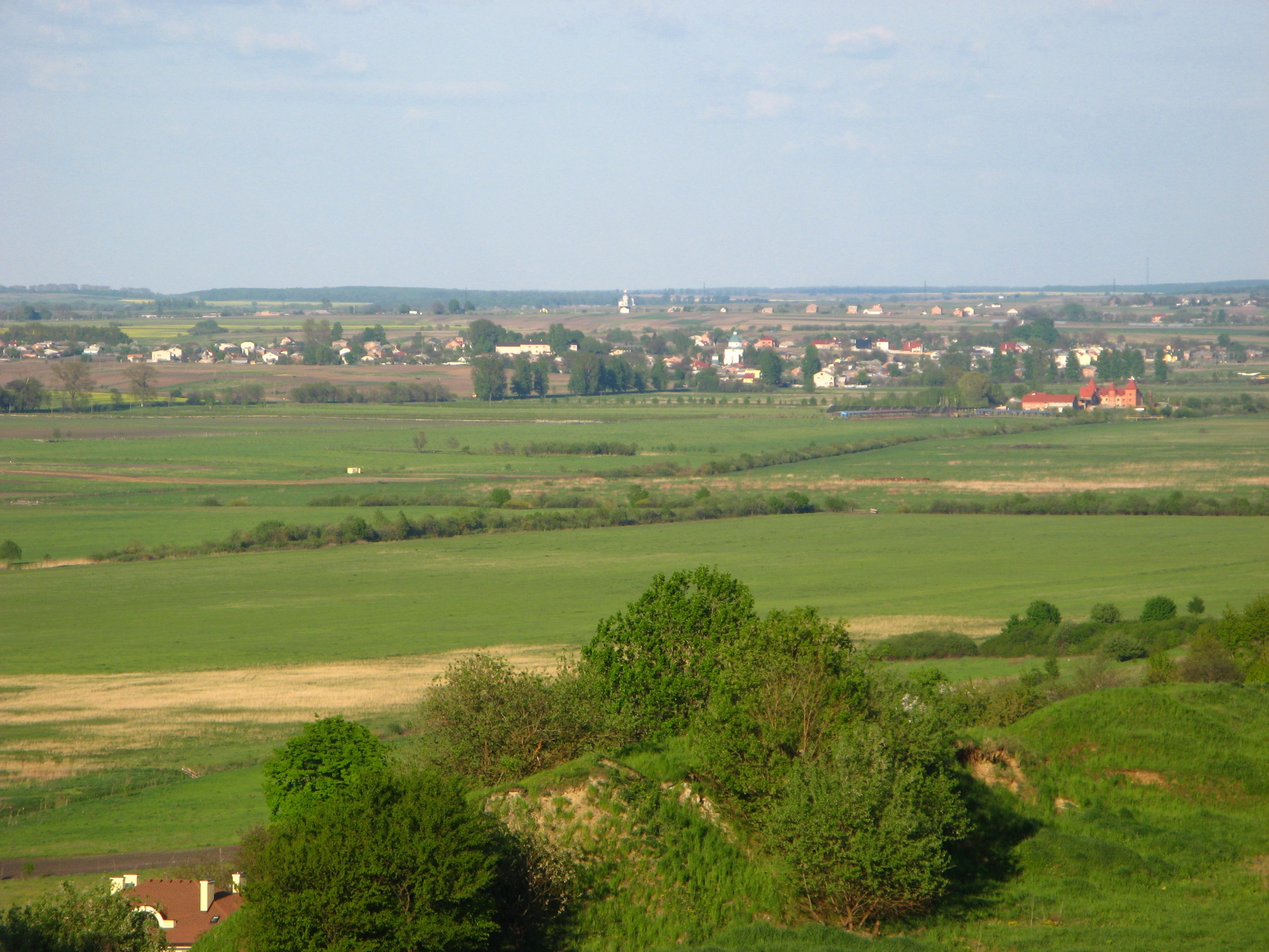 Надбужанська котловина (Львівська обл., Жовківський р-н)